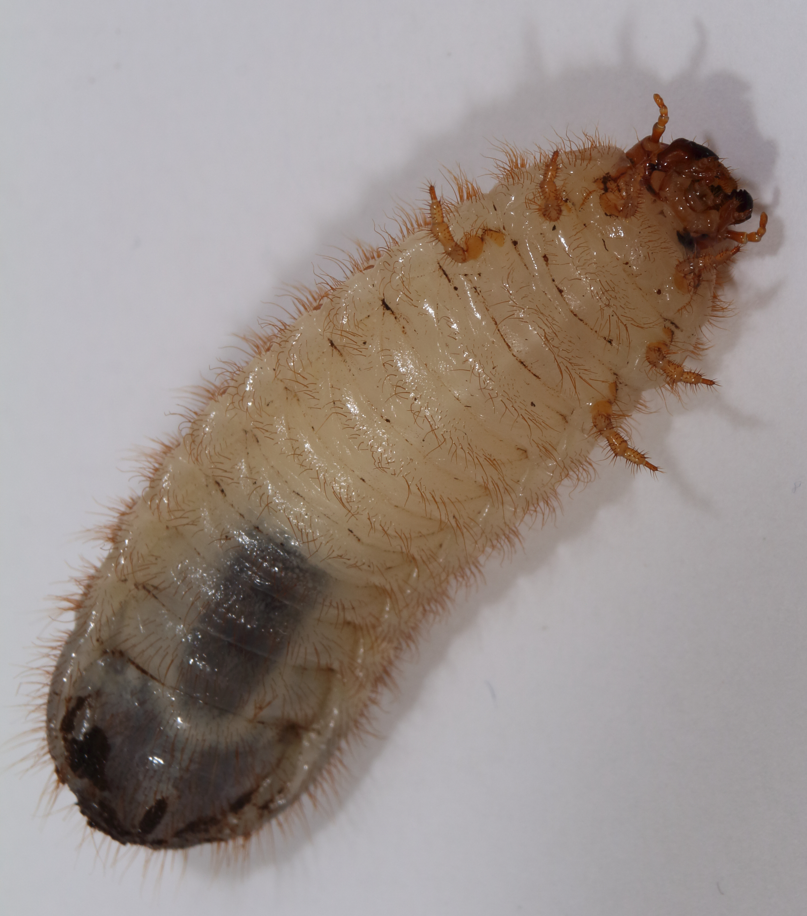 Engerling des Goldglänzenden Rosenkäfers, Cetonia aurata, ca. 32mm. Gefunden im steinernen Blumenkasten beim Umtopfen Die abgebildete Larve wurde am 23. März 2015 von IKAl auf WP:RBIO/B bestimmt, bestätigt von Meloe ebenfalls dort The larva shown here has been identified by IKAl on WP:RBIO/B 2015, March 23rd, confirmed also there by Meloe